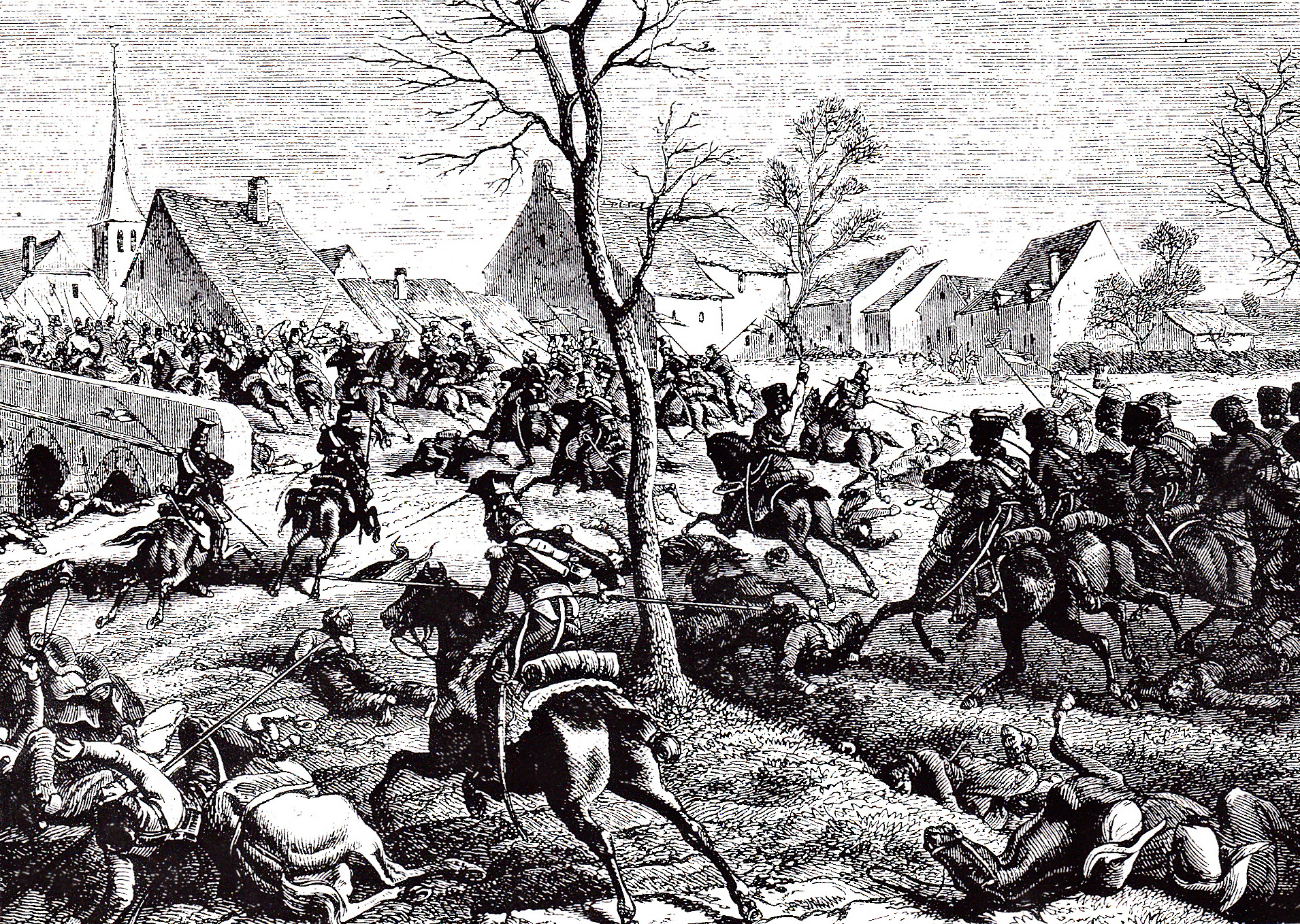 Combat de Berry-au-Bac (5 mars 1814). La cavalerie française de la Garde culbute les cosaques russes : au premier plan à droite, on distingue les chasseurs à cheval de la Garde, qui galopent à la suite des lanciers polonais de la Garde, visibles aux premier et second plans. Ces derniers, commandés par le général Pac, refoulent leurs adversaires et s'emparent du pont qui enjambe l'Aisne, capturant 200 prisonniers, deux canons et les bagages des Russes.